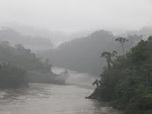 Lugar donde el río Inambari entra a la llanura amazónica.